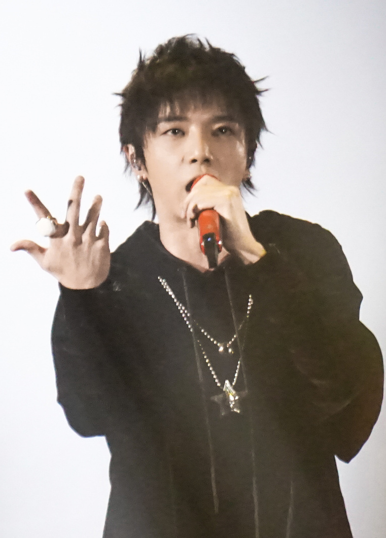 华晨宇 2017火星 演唱会